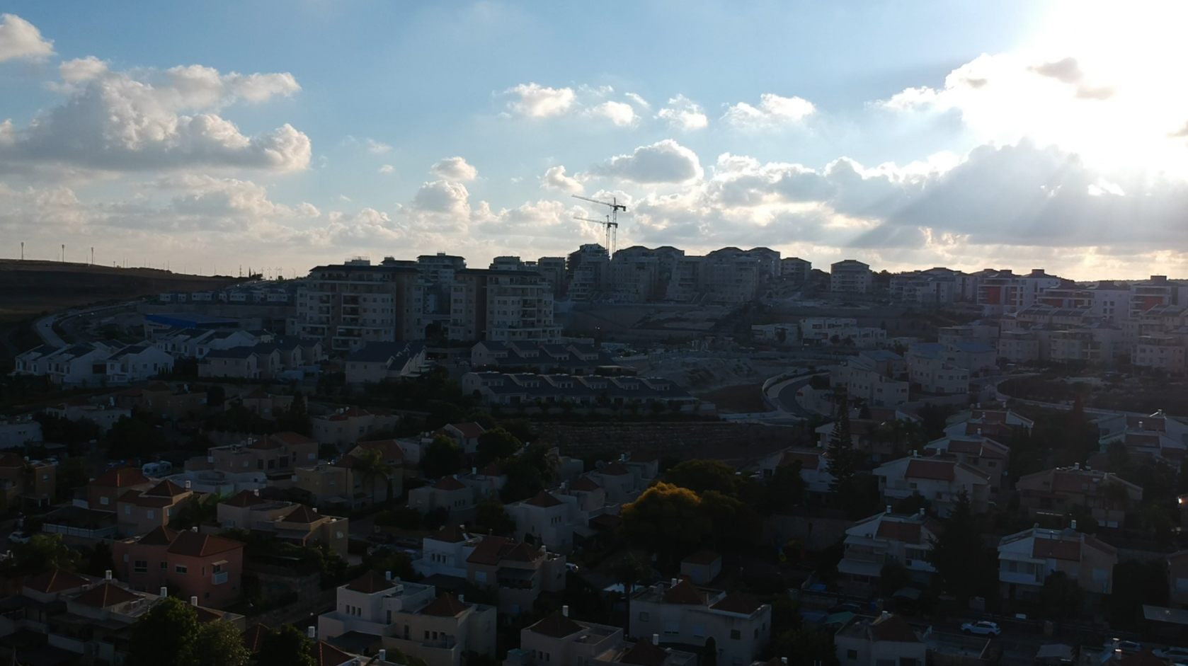 שכונת שער הגיא, השכונה הגבוהה ביותר בעיר. נחשבת לשכונה הגדולה ביותר בעיר יקנעם וגם כחלק מהשכונות היפות ביותר בישראל.